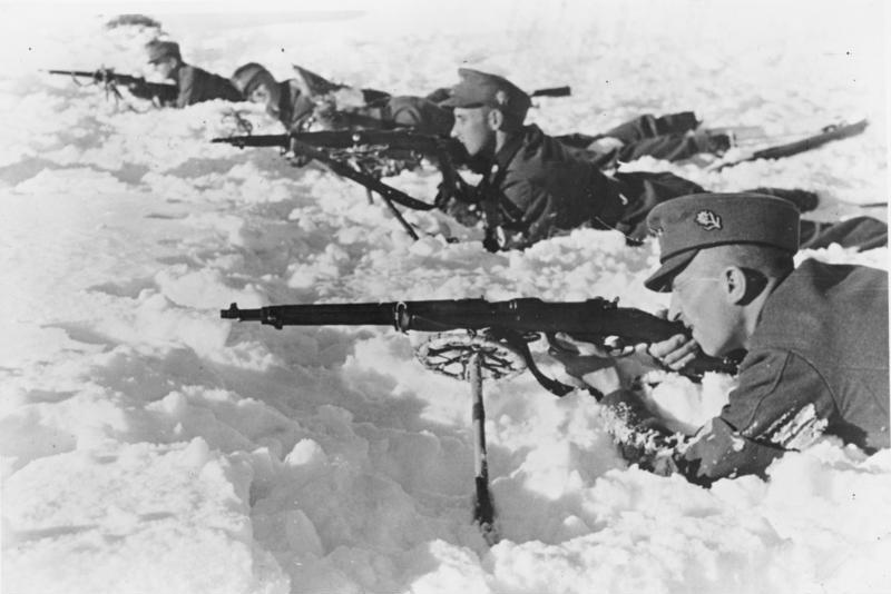 Arbeitsmänner werden ausgewählt. Auch in diesem Winter wird die wehrmäßige Schießausbildung weiterbetrieben. Der Arbeitsmann und künftige Soldat soll durch diese Ausbildung schon jetzt für seinen späteren Einsatz im Osten oder Norden vorgebildet werden. Besonderer Wert wird auf wehrmäßiges Verhalten im Gelände und auf den Ausdauer erfordernden Langlauf in der Ebene gelegt. Reichslehrgang im wehrmäßigen Schilauf auf der Planei bei Schladning. Üben der Anschlagarten, Gewehr auf den Schistöcken aufgelegt. RAD Grund 5024 E.M. Obis